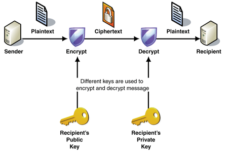 Монгол: Ерөнхий процесс зураг